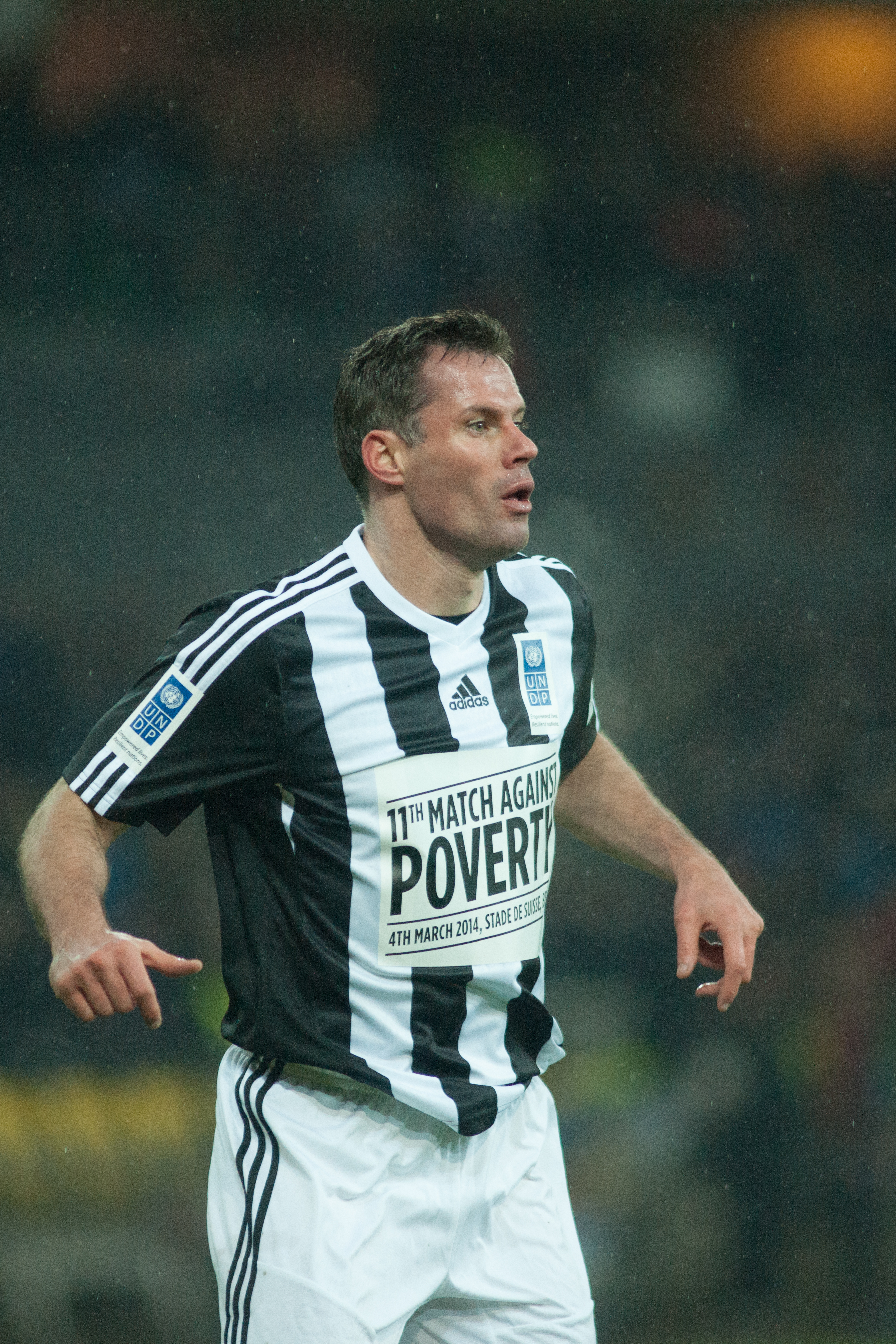 Football against poverty 2014 - Jamie Carragher